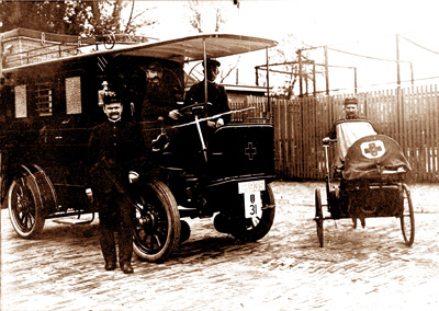 Electrische ambulance and fietsbrancard GG&GD Amsterdam ca. 1908